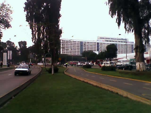 Hospital Edgardo Rebagliatti Martins, Lima, Perú